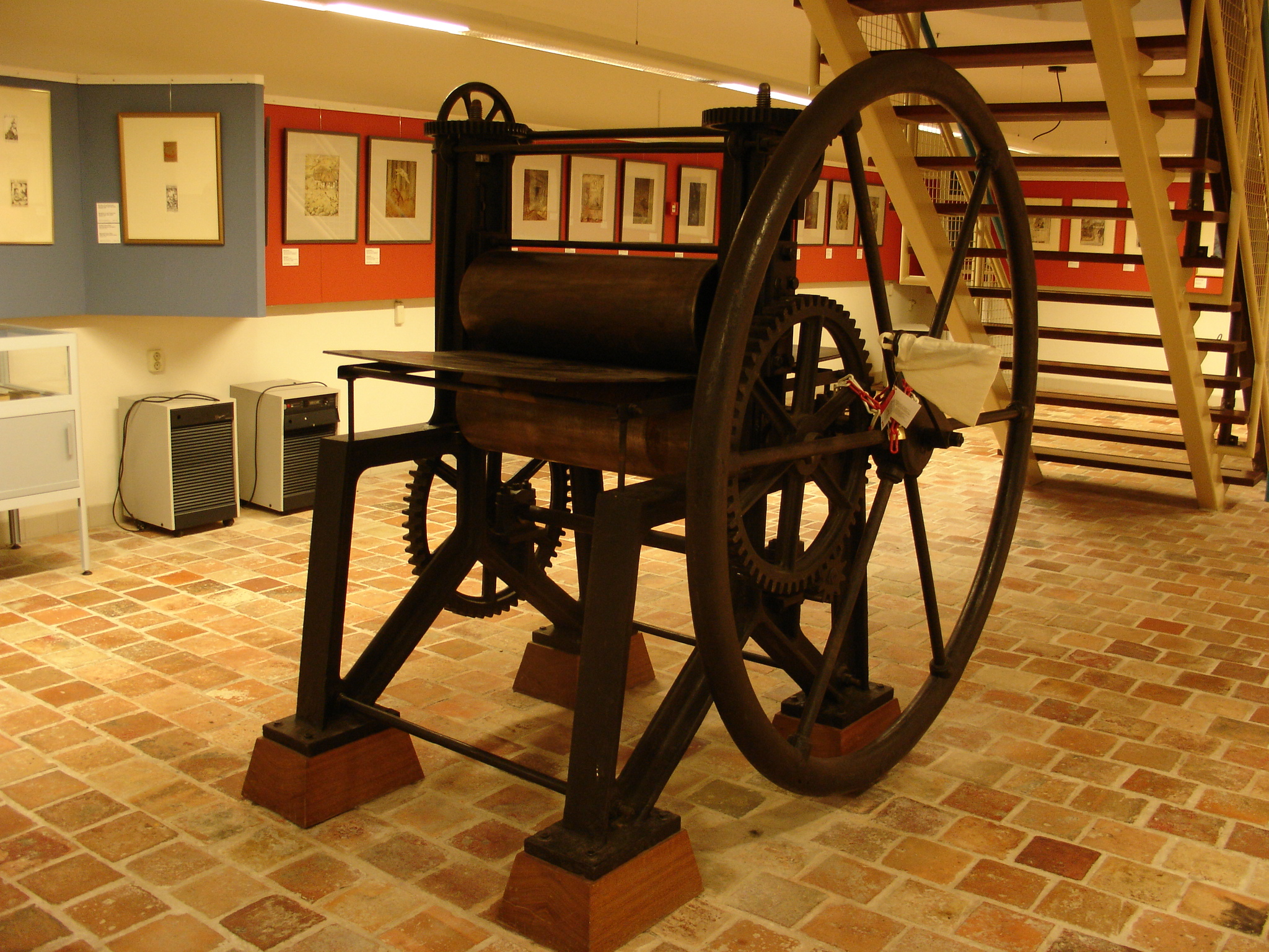 Etspers in het Anton Pieckmuseum in Hattem